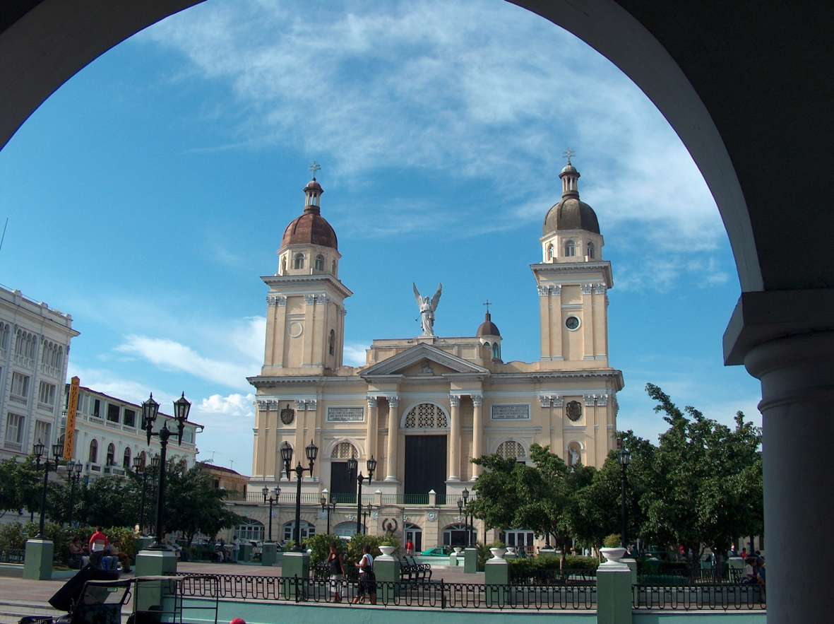 La cathédrale métropolitaine de Santiago de Cuba.